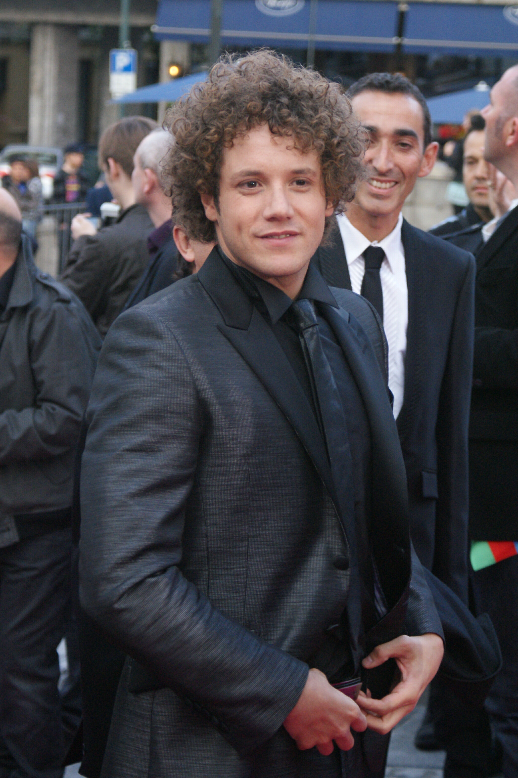 Daniel Diges